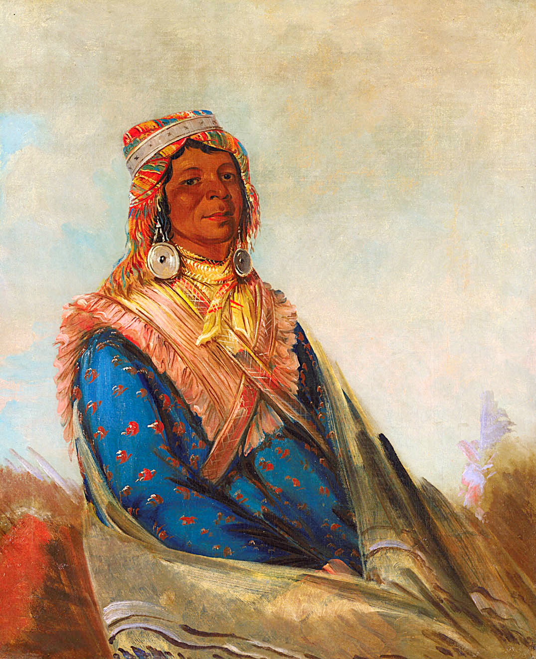 Hól-te-mál-te-téz-te-néek-ee, Sam Perryman